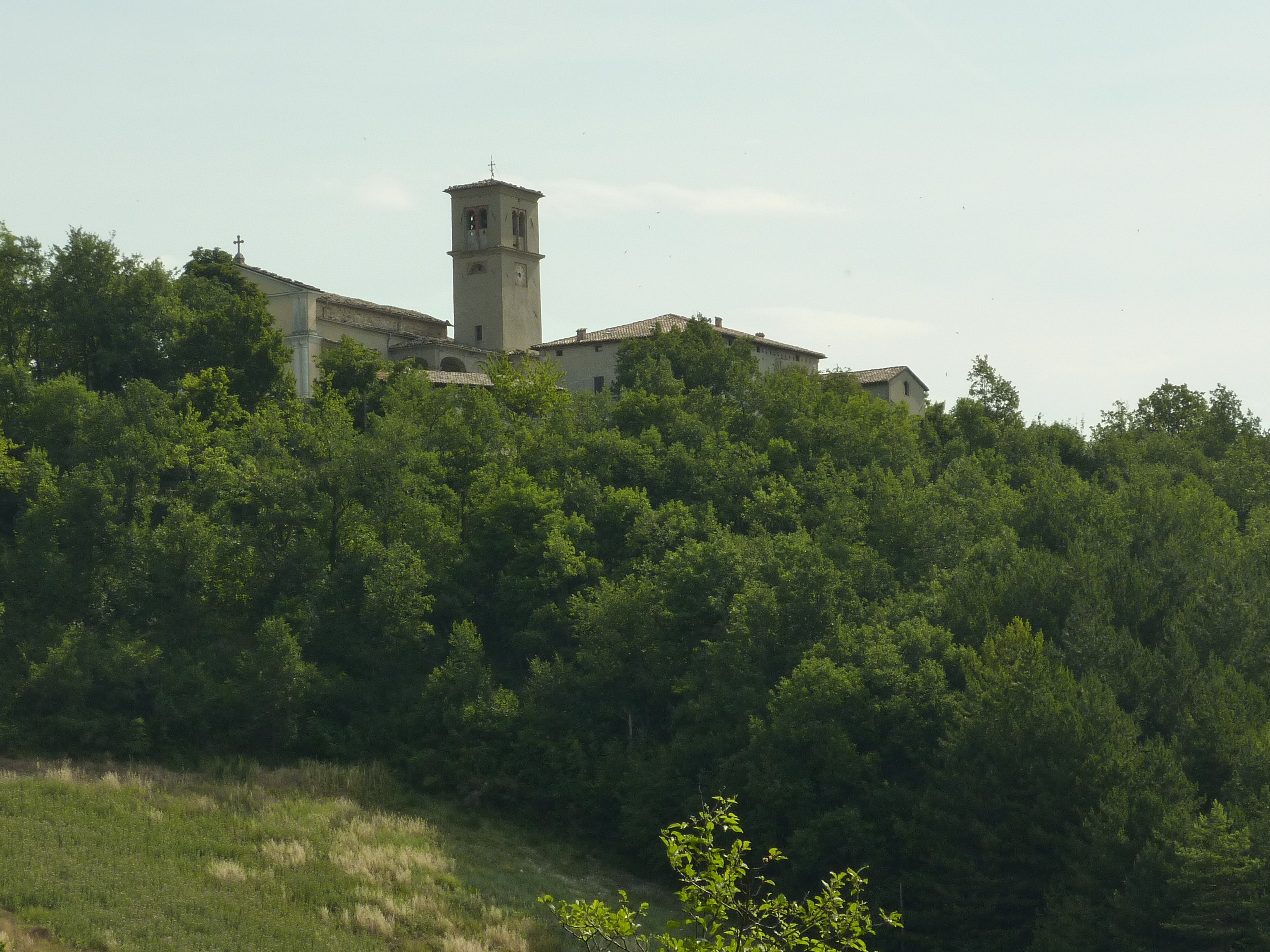 Il campanile della Pieve di Castrignano (Langhirano, Parma).